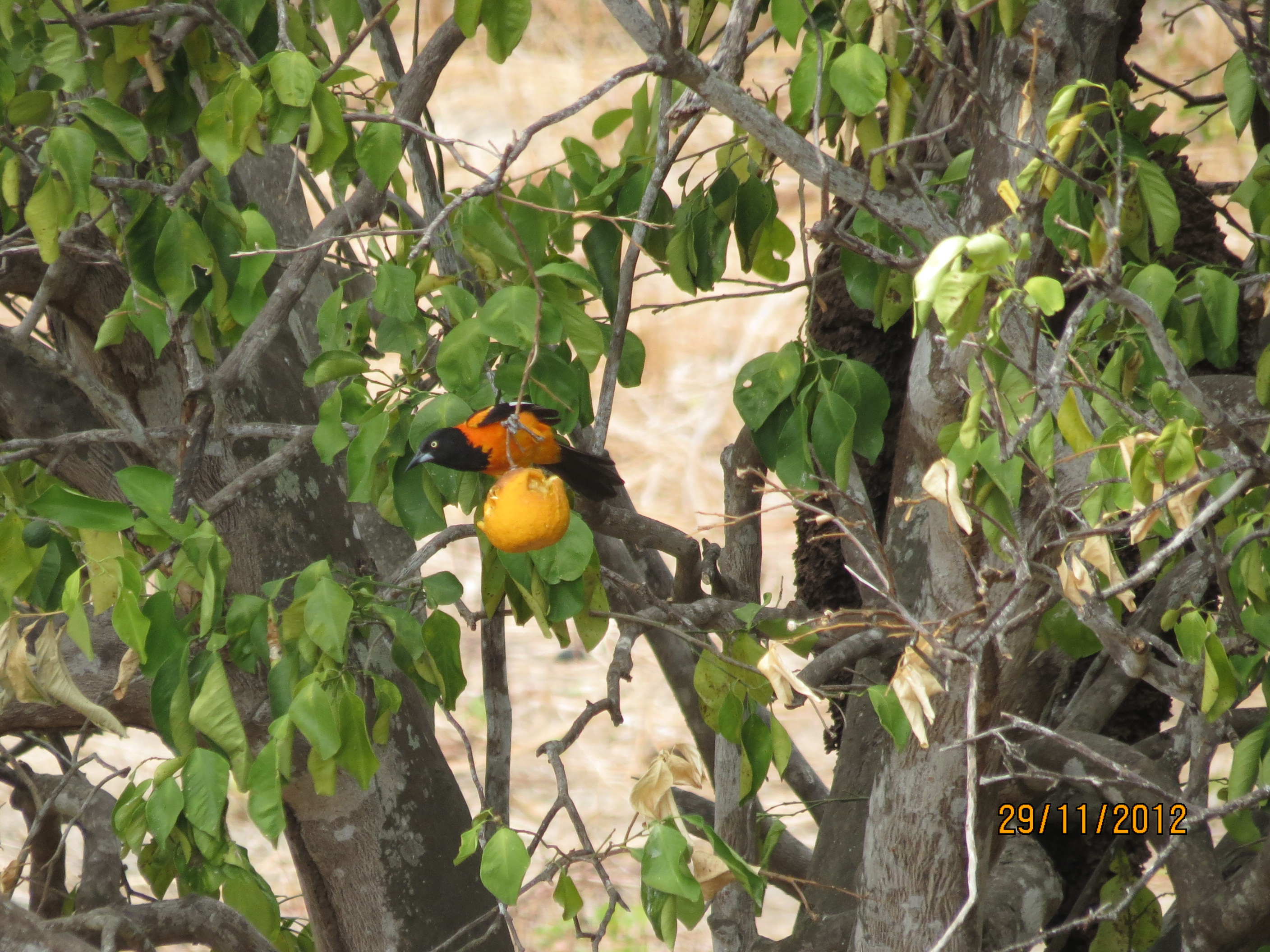 Pássaro Currupião comendo fruta.